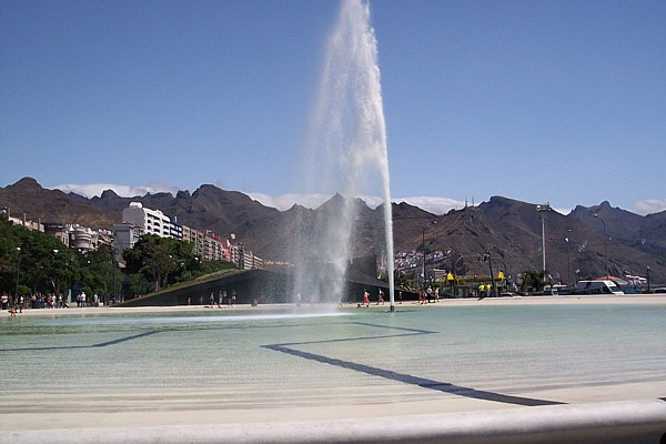 Plaza de España de Santa Cruz de Tenerife (Tenerife, España) tras su remodelación en julio de 2008.